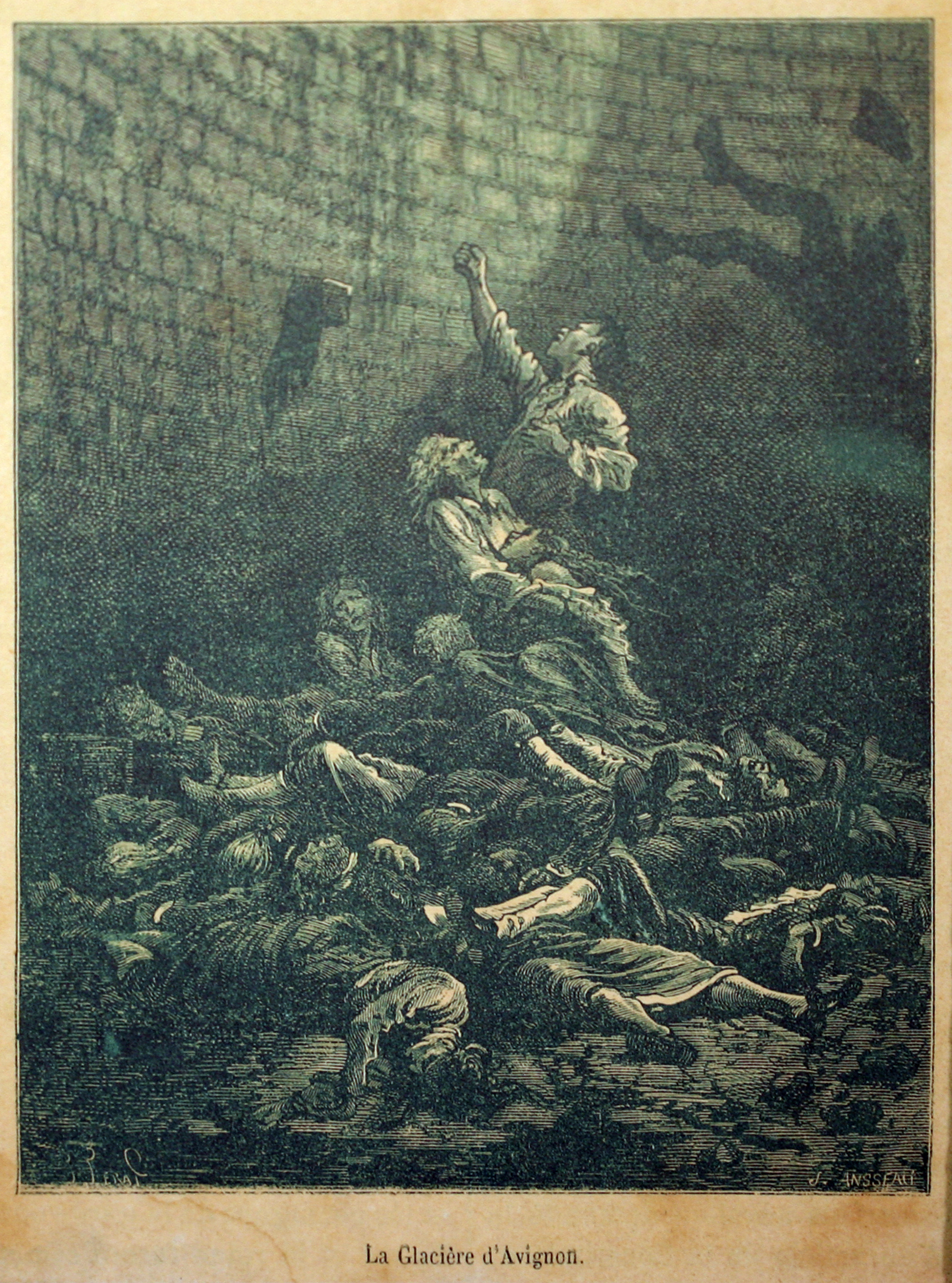 Illustration du massacre de la glacière - Palais des Papes, Avignon, Vaucluse, France